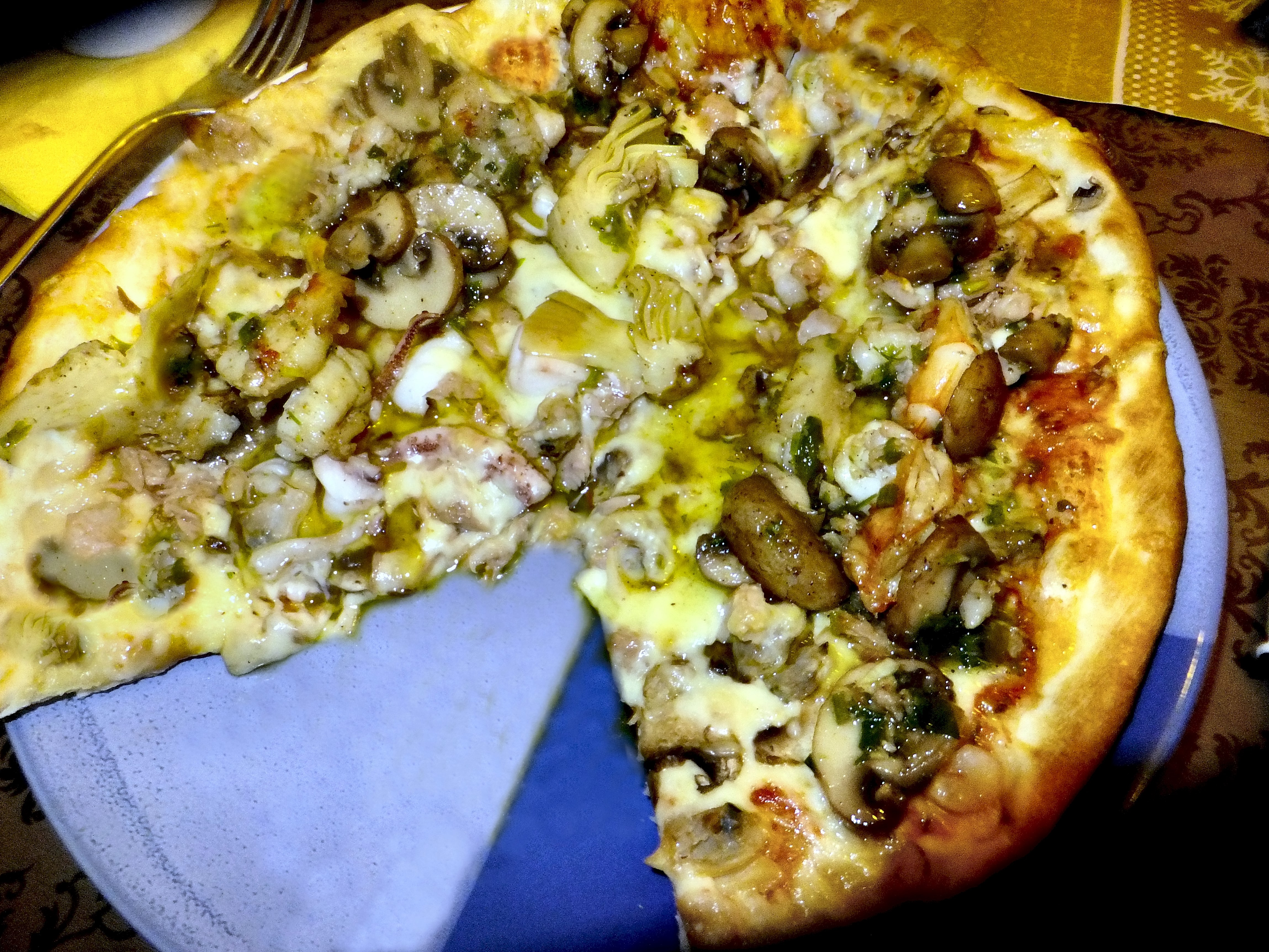 Pizza Frutti di Mare